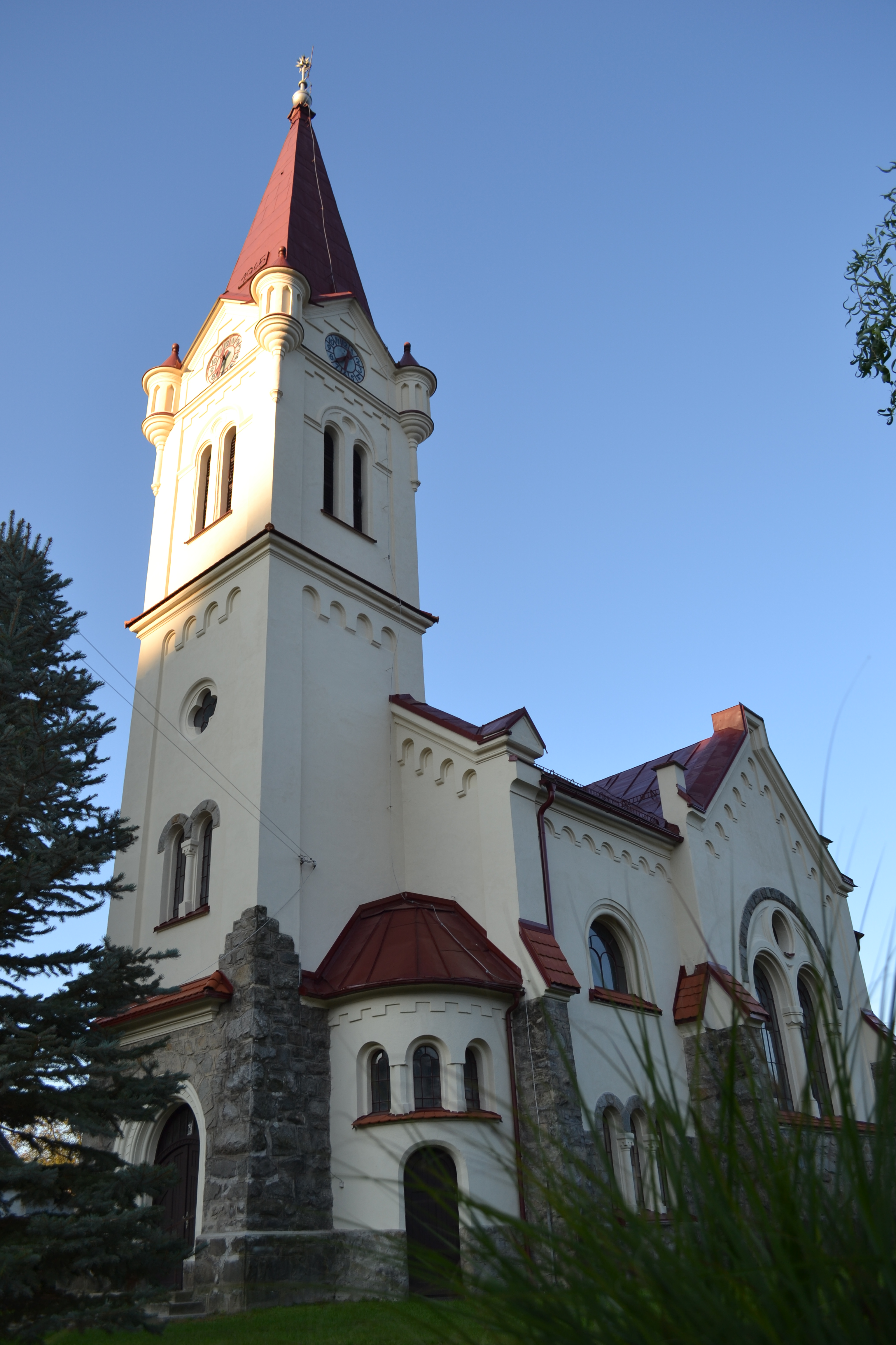 Evanjelický kostol postavený v roku 1922 v Českom Brezove